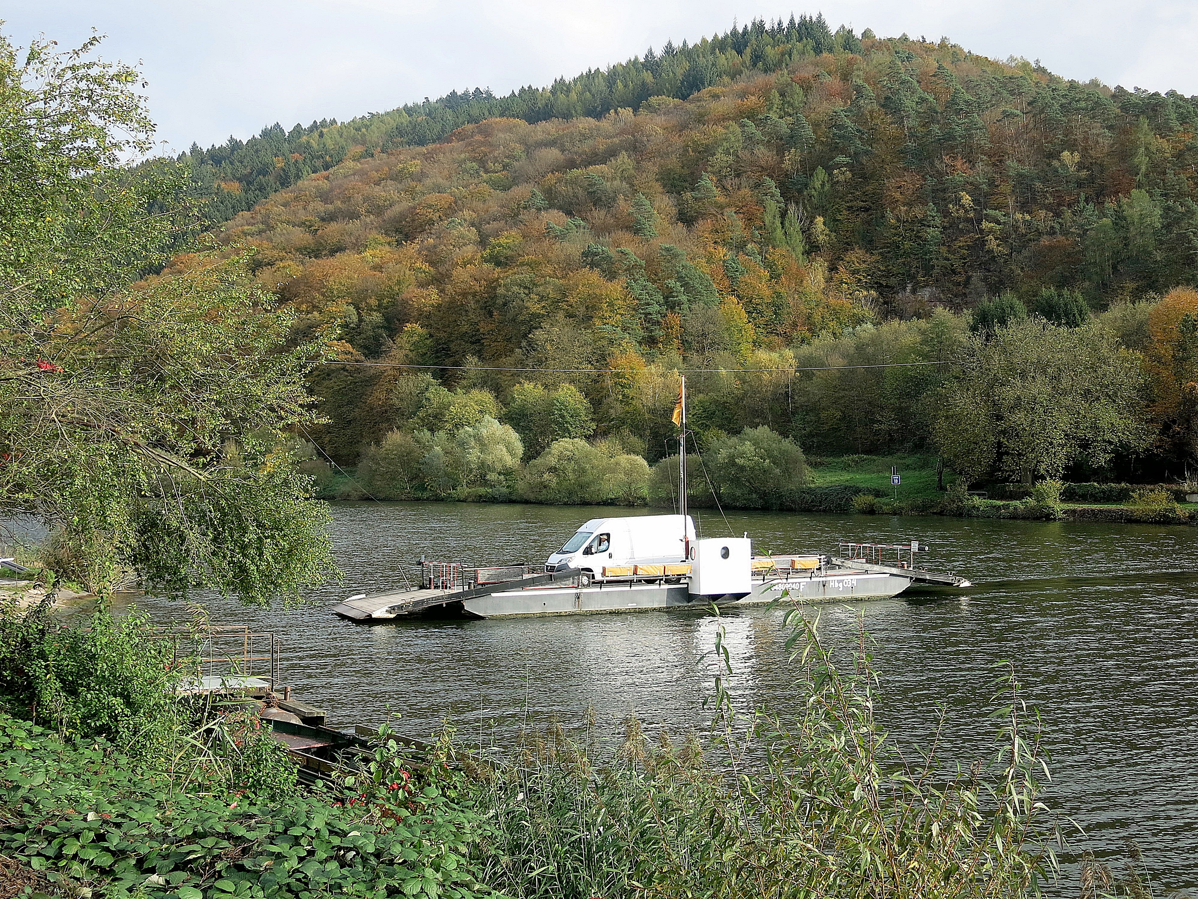 Überfahrt von Neckarhäuserhof nach Neckarhausen